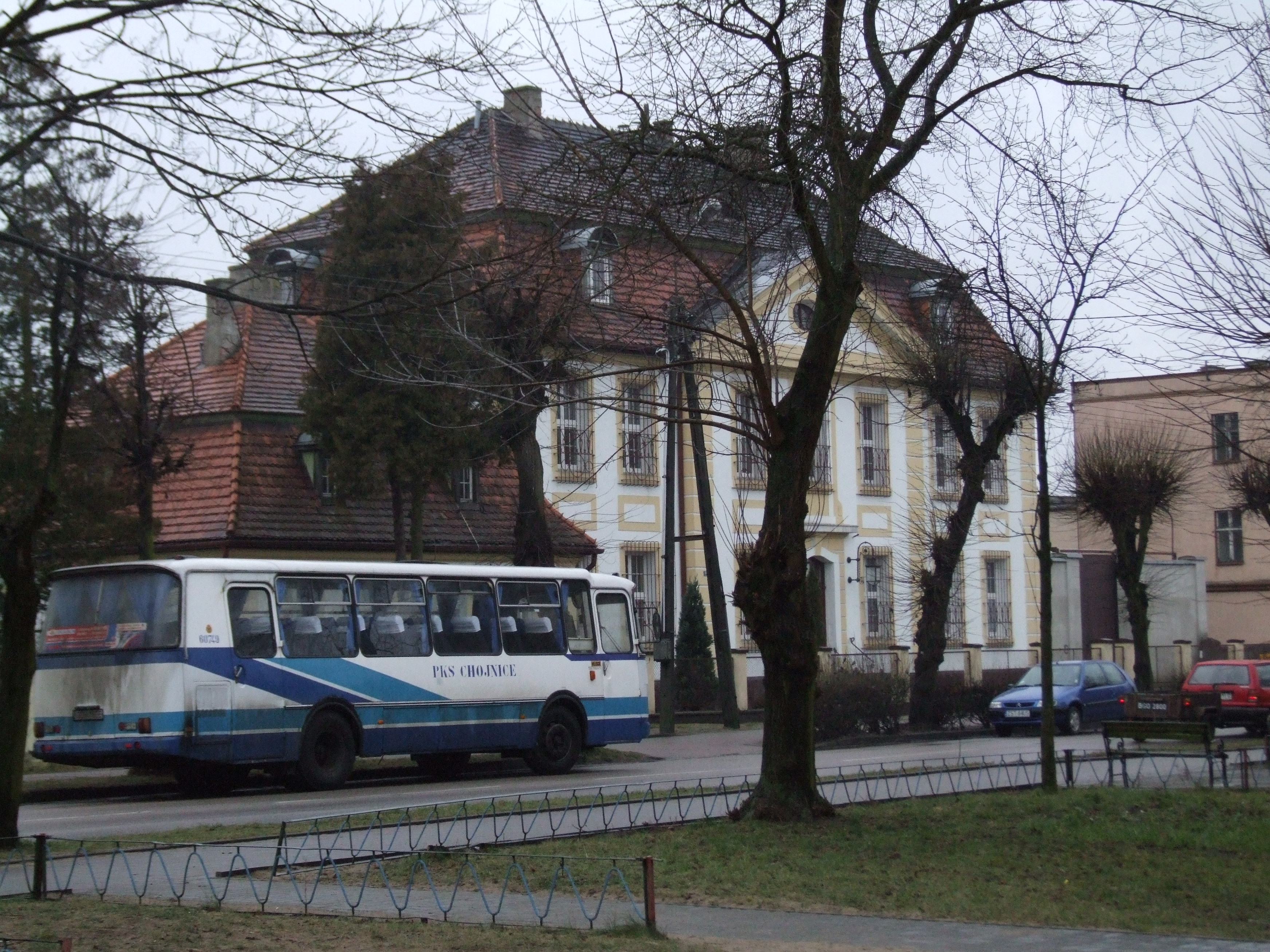 Czersk